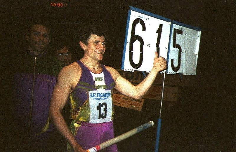 Фотография с диска Анастасии Федоренко «Донецк. Увидеть и полюбить».